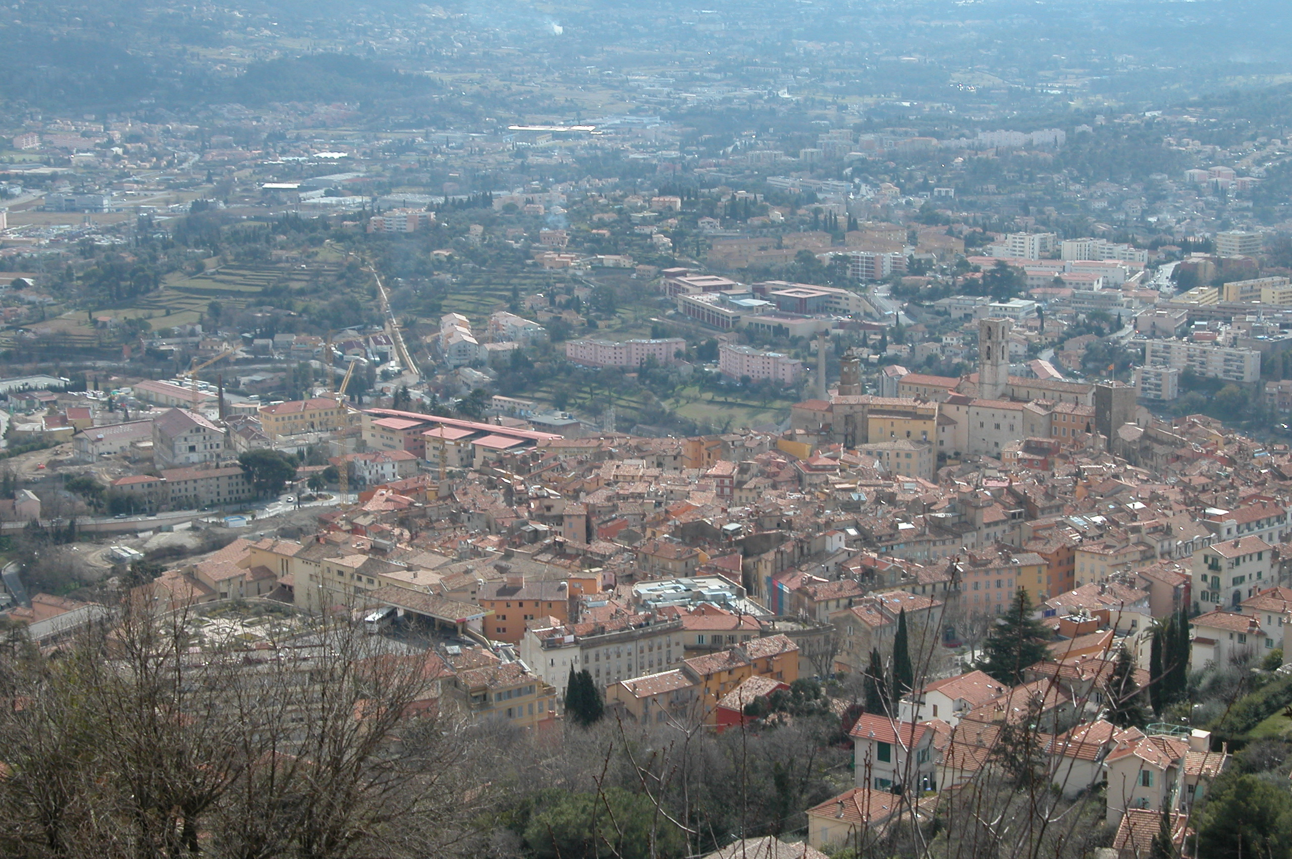 Vue de la Ville de Grasse. Photo Personnelle de Geoffrey06.